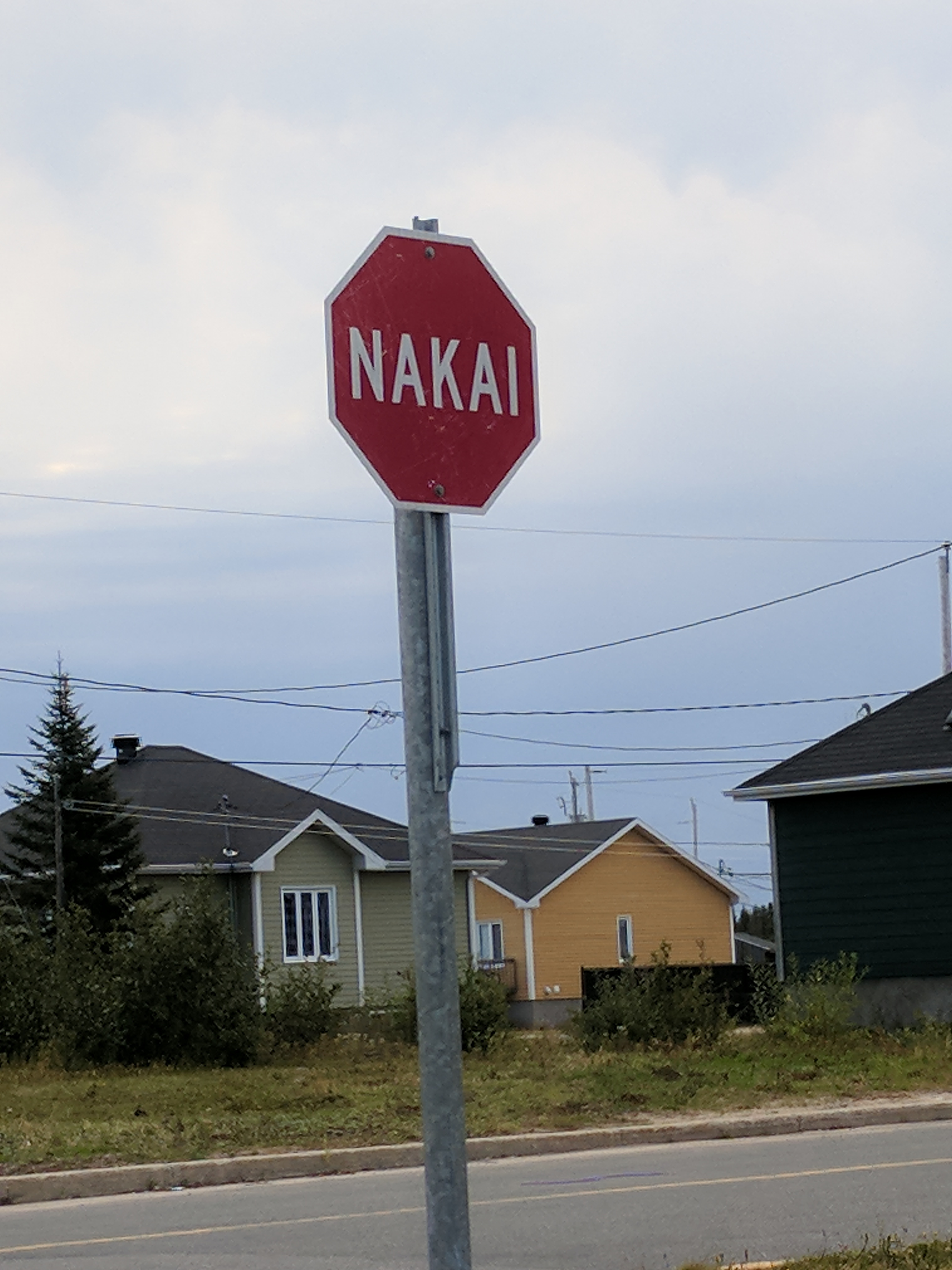 Panneau d'arrêt en innu-aimun à Maliotenam, une réserve indienne innue au Québec